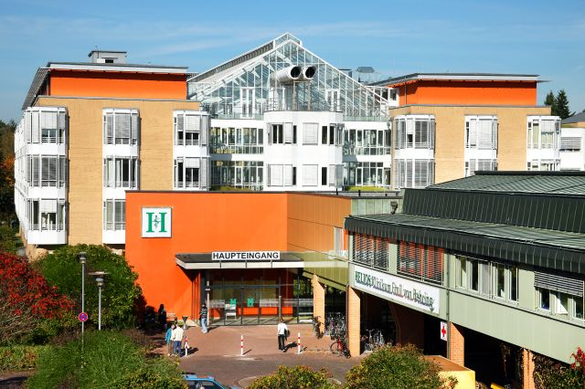 Außenansicht des Helios-Klinikums Emil von Behring heute (Haupteingang)